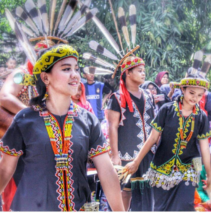 Busana Adat Dayak